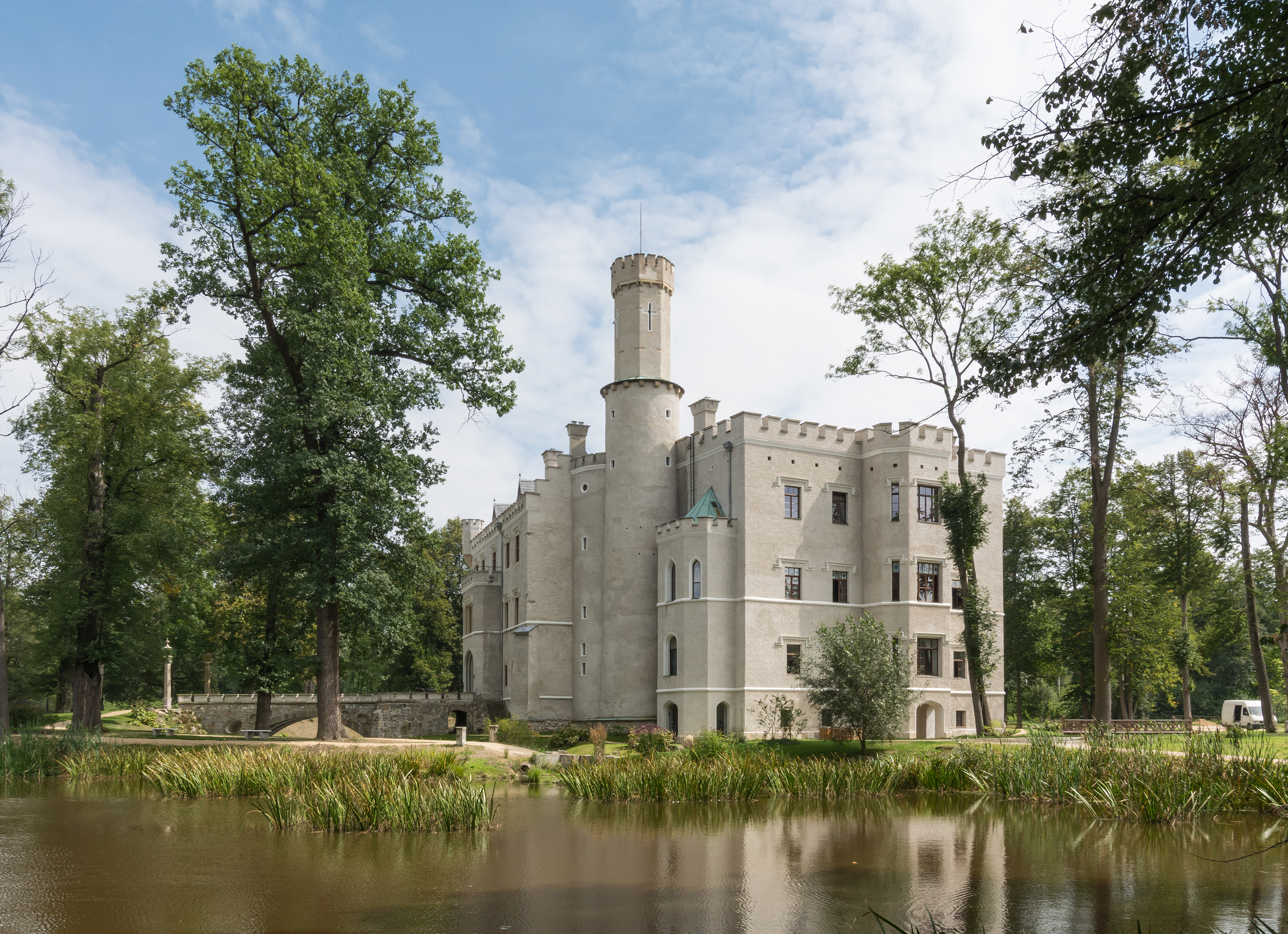 Karpniki, zespół pałacowy, 1 poł. XVII